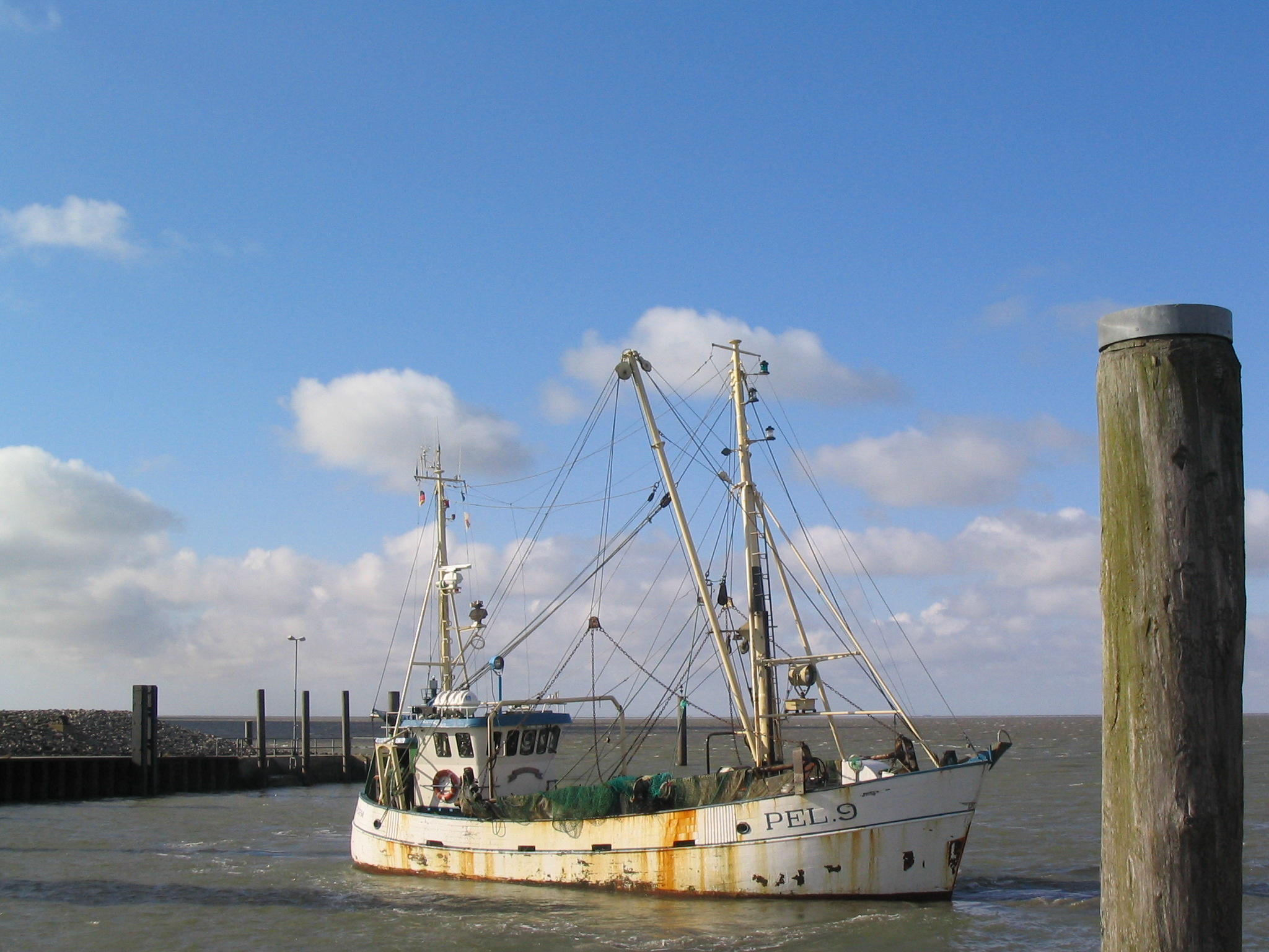 Trawler in Strucklahnungshörn, Nordstrand